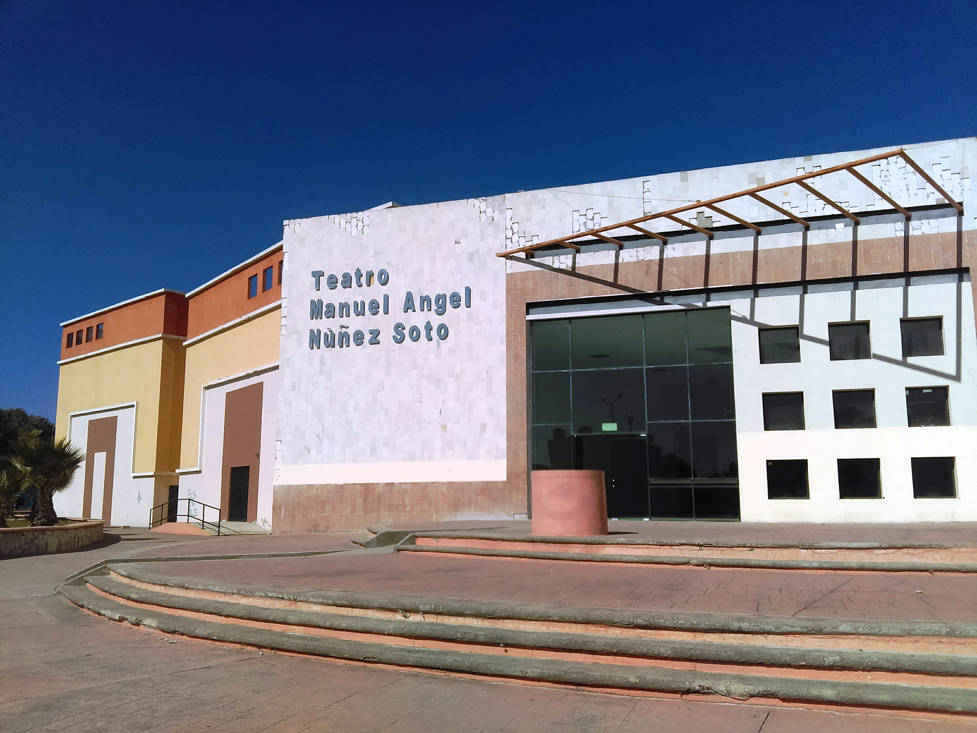 Teatro Manuel Ángel Núñez Soto en Actopan, Hidalgo